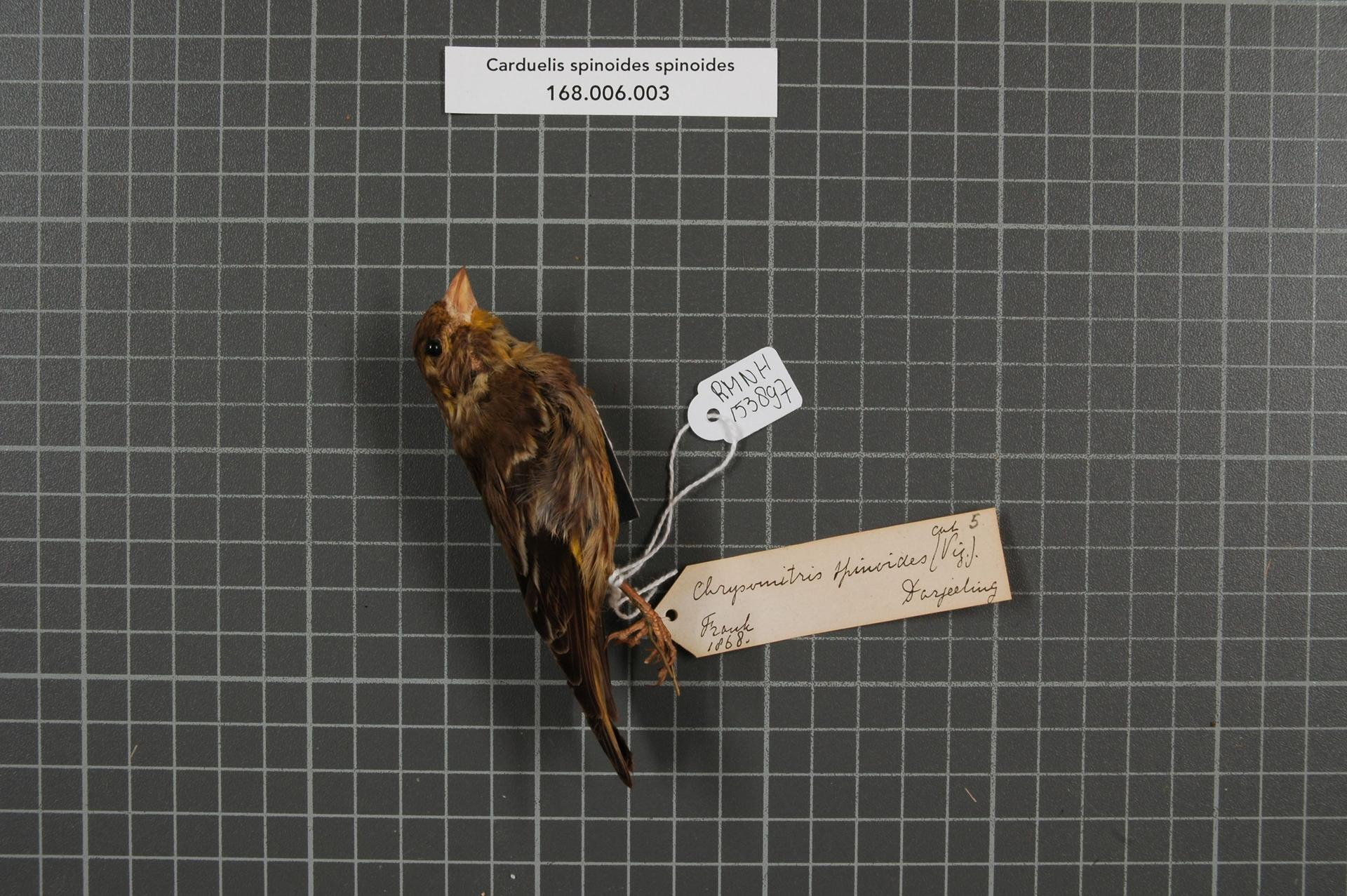 Carduelis spinoides spinoides Vigors, 1831